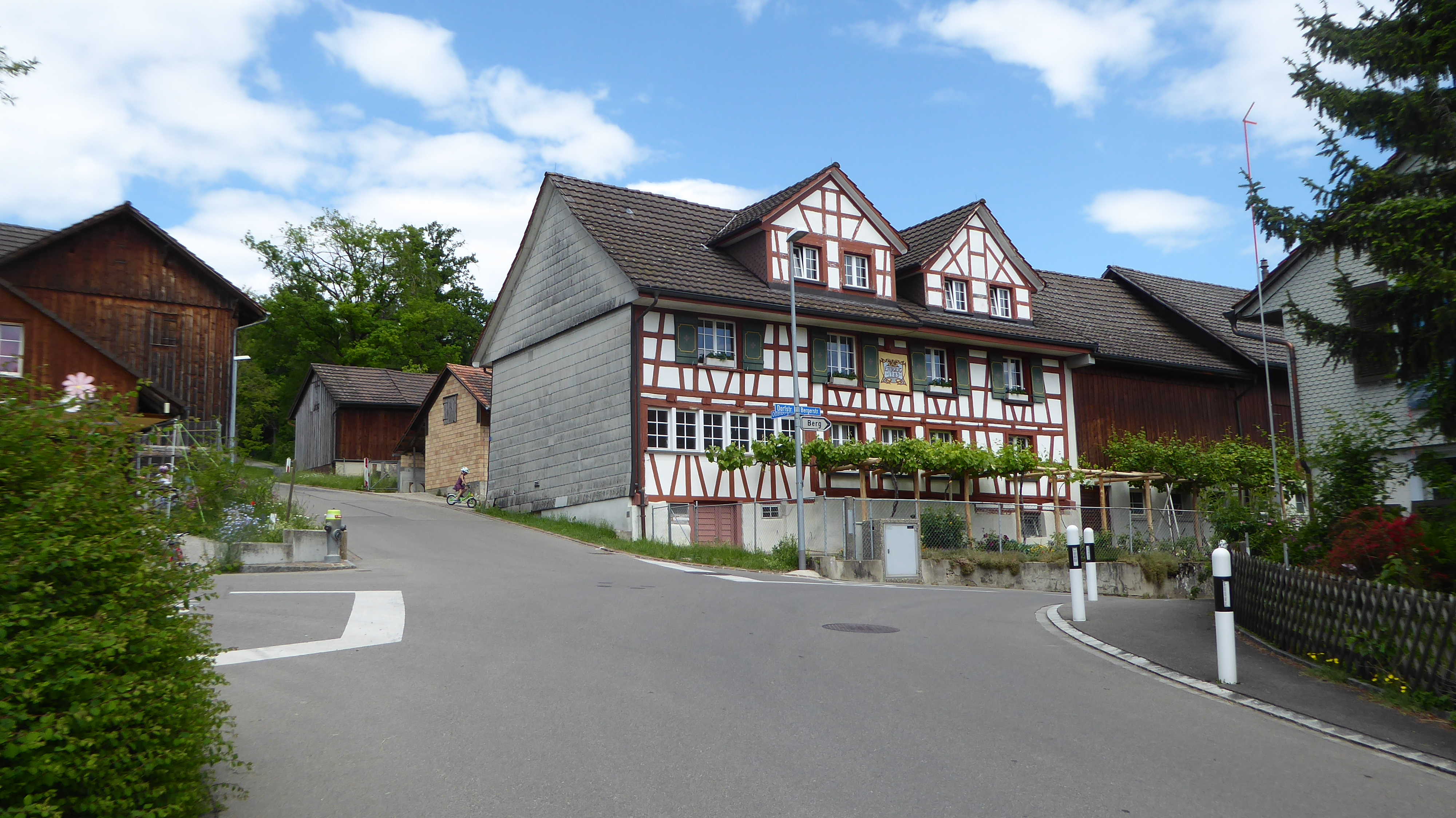 Weerswilen